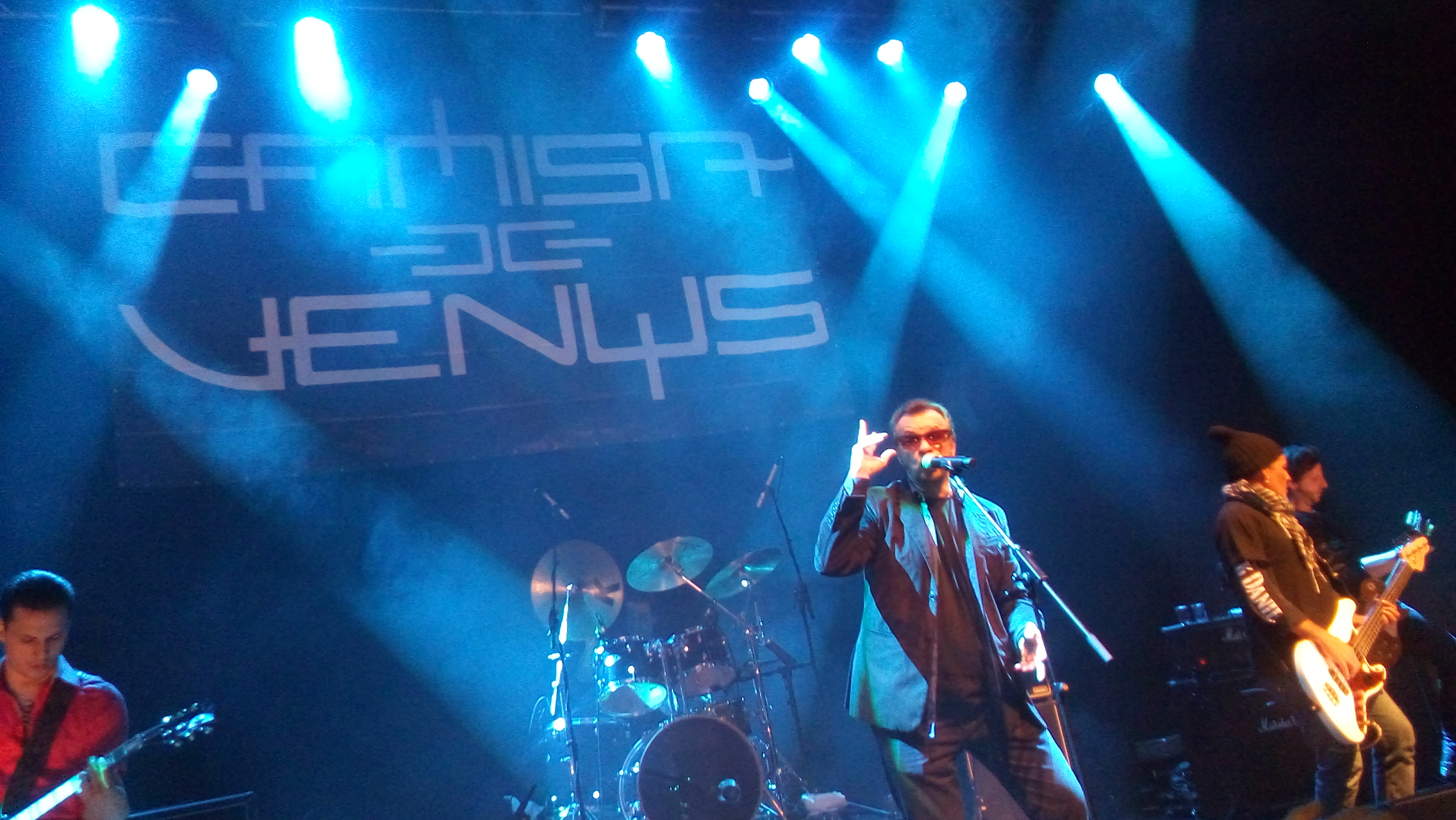 Show do Camisa de Vênus no Sesc Jundiaí na noite de 22 de Julho de 2016 - Lançamento do álbum "Dançando na Lua"